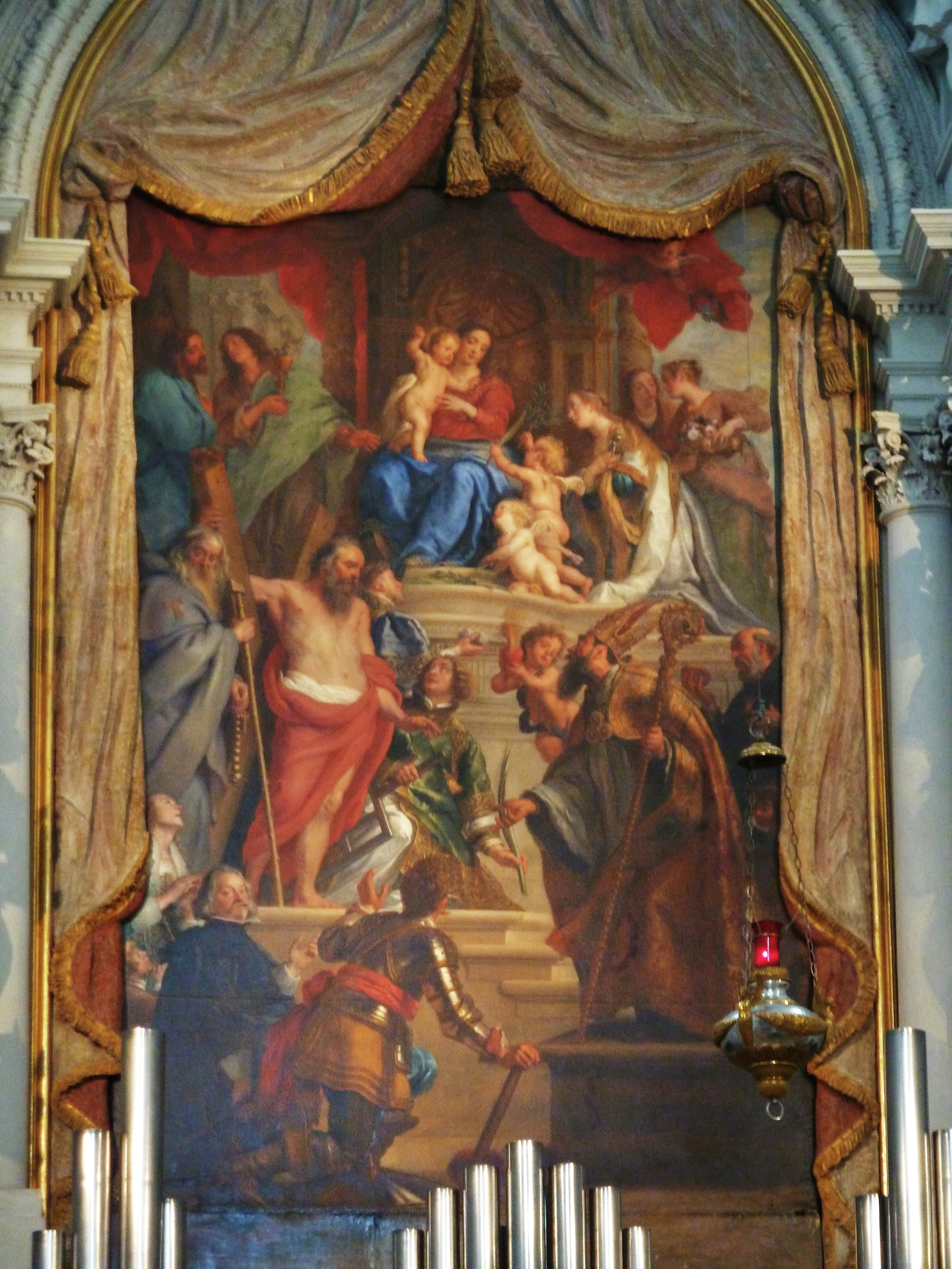 Maria auf dem Thron mit Heiligen zu ihren Füßen